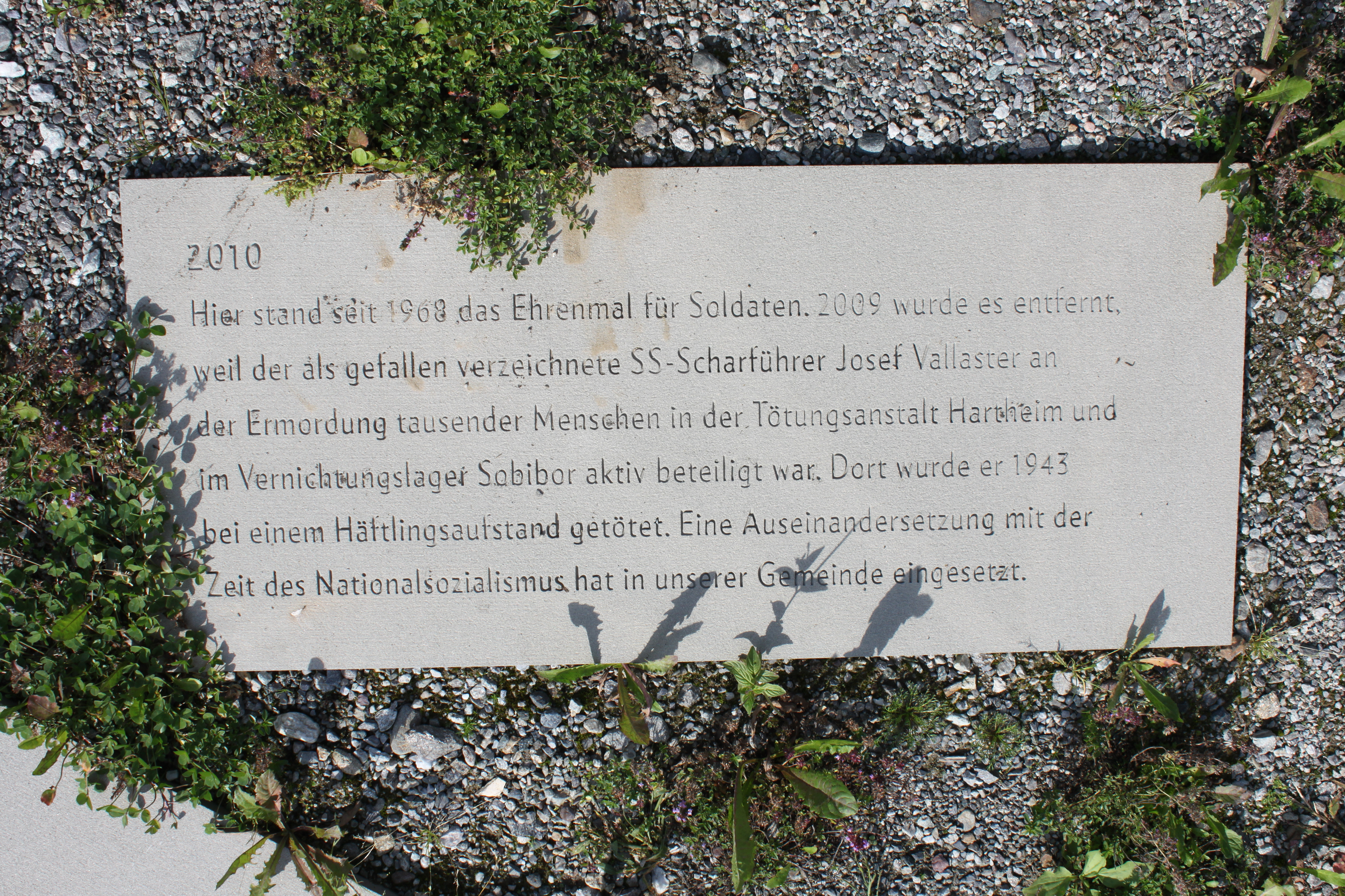 Neues Kriegerdenkmal 2010 in Silbertal, eine beschriftete Steinplatte, mit Nennung von Josef Vallaster